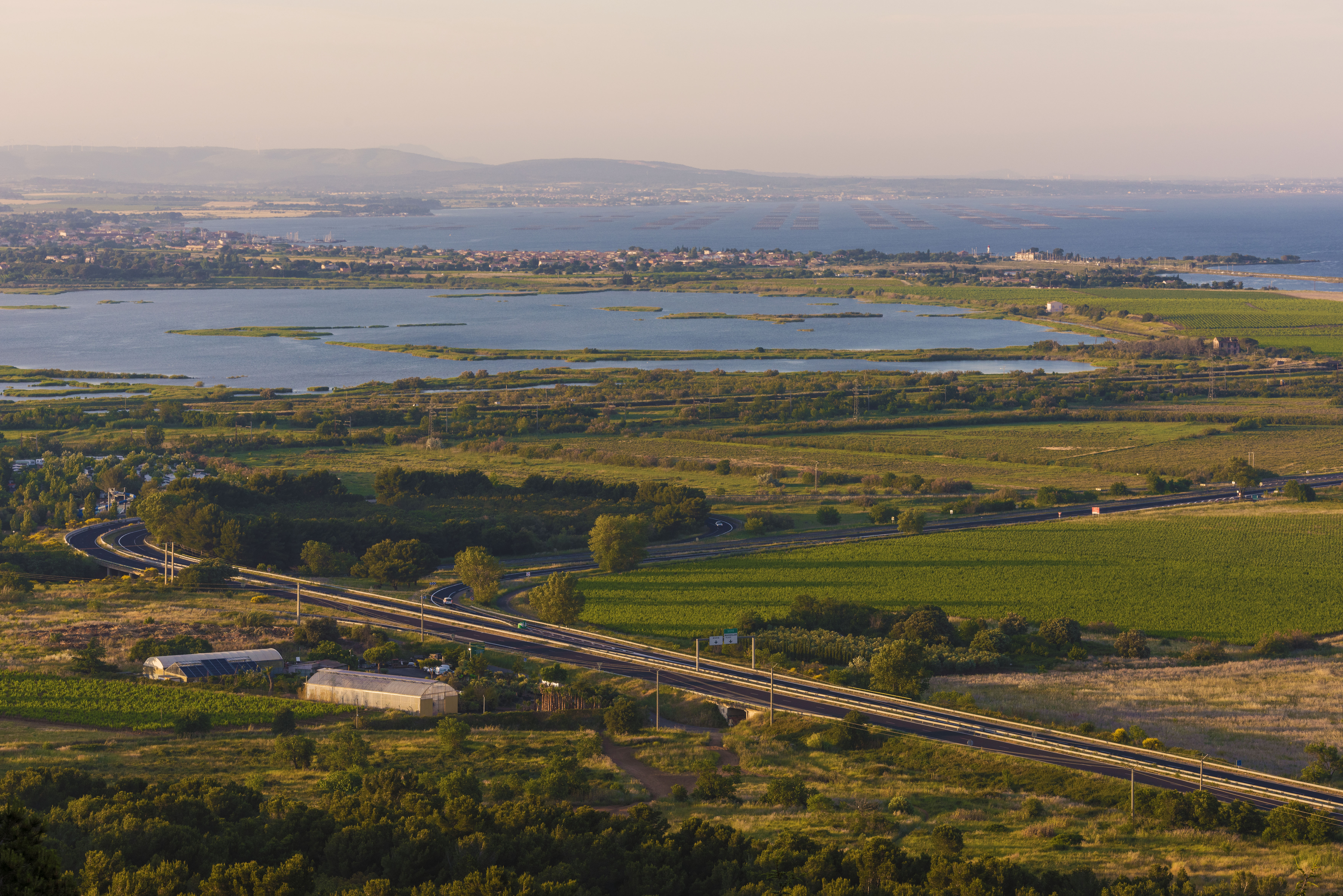 L'Étang du Bagnas et l'étang de Thau (au fond à droite). Réserve naturelle du Bagnas. Hérault, France.